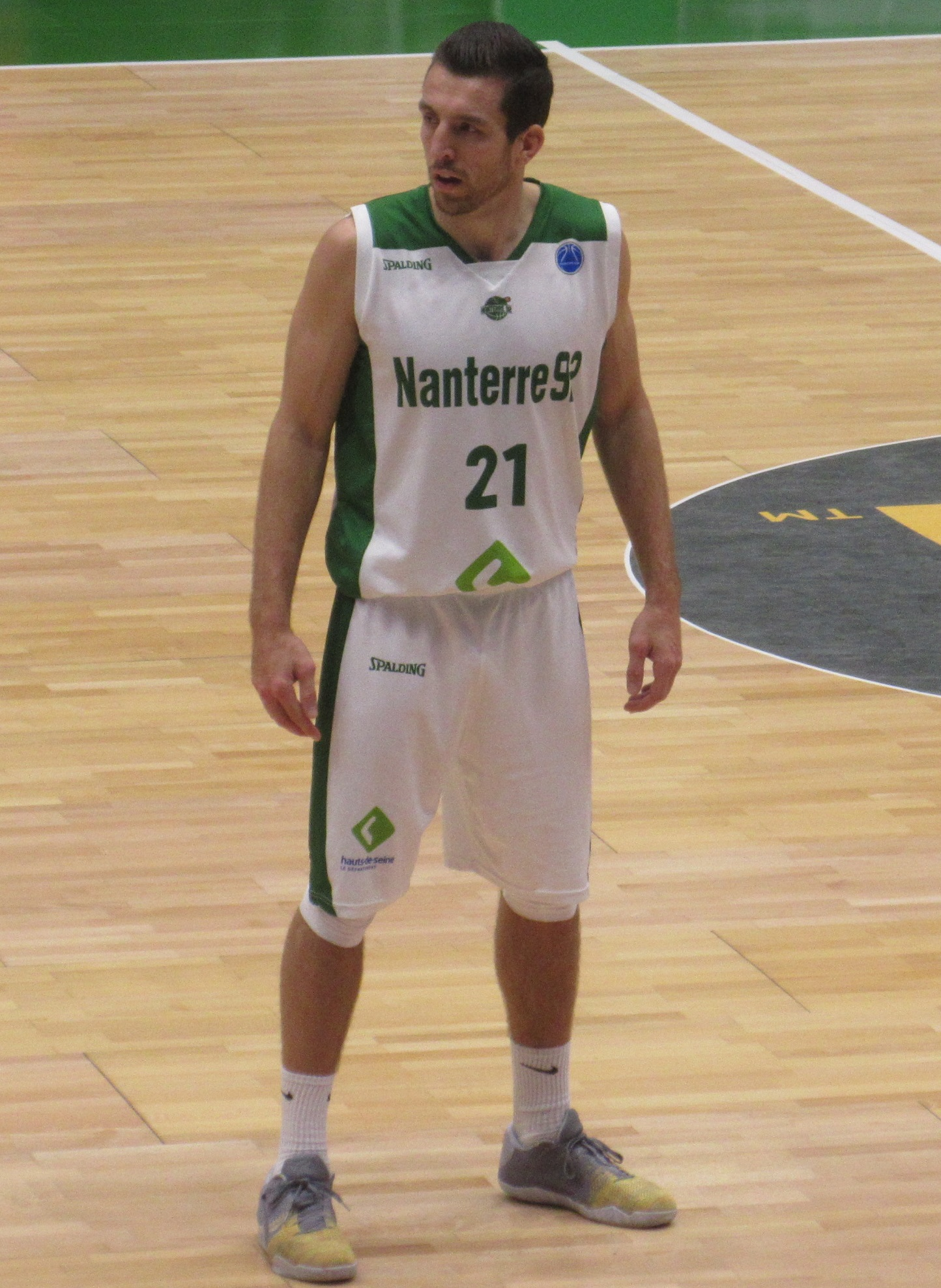 Spencer Butterfield avec le maillot de Nanterre 92